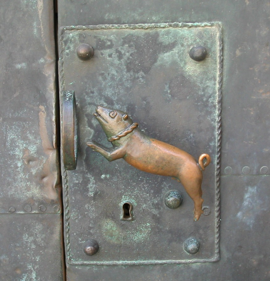 Eine Klinke an der Domtür in Quedlinburg an der St. Servatii-Kirche in Gestalt eines (inneren) Schweinehundes der zum Eintreten in die Kirche überwunden werden muss. Geschaffen vom Magdeburger Bildhauer Heinrich Apel